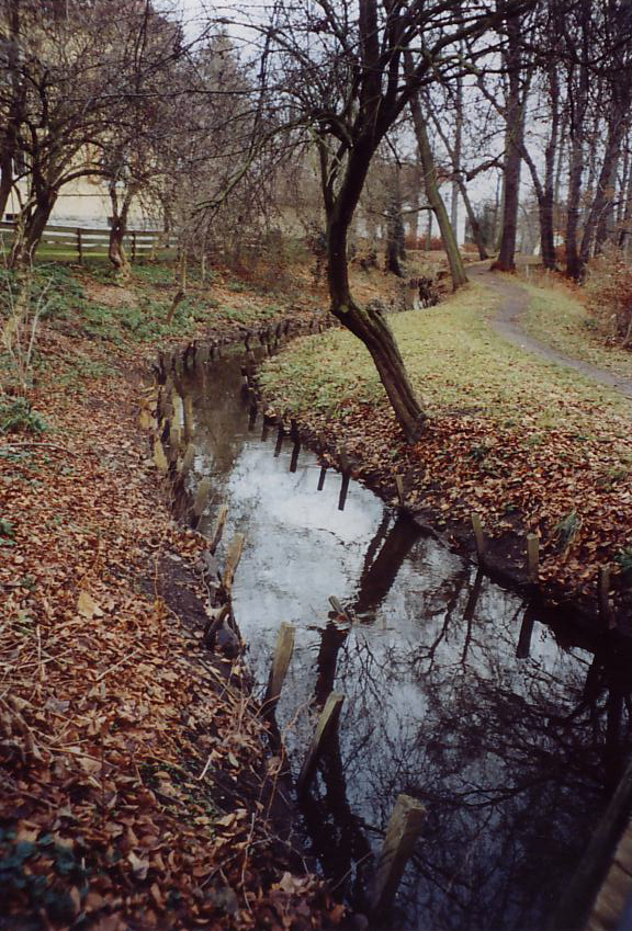 Leinakanal im Gothaer Schlosspark